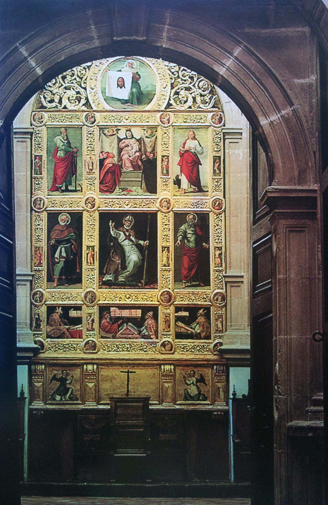 Retablo de San Pedro de Osma que preside la Sala Capitular de la Catedral de Jaén. Esta sala fue construida por Andrés de Vandelvira y, junto con la Sacristía, es una de las obras más importantes del Renacimiento español.